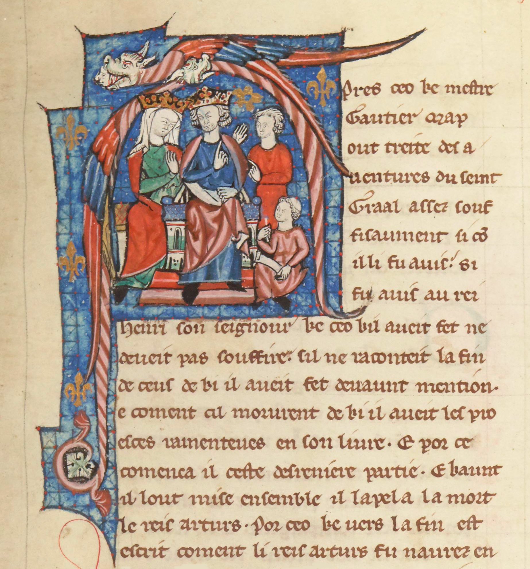 Aliénor d'Aquitaine et Henri II Plantagenêt écoutent Gautier Map conter l'histoire de Lancelot du Lac. Enluminure ornant le manuscrit Lancelot du Lac de Gautier Map, deuxième partie, la Quête du Saint Graal, la Mort d'Arthus, vers 1301-1400, BnF, Manuscrit Français 123, folio 229.